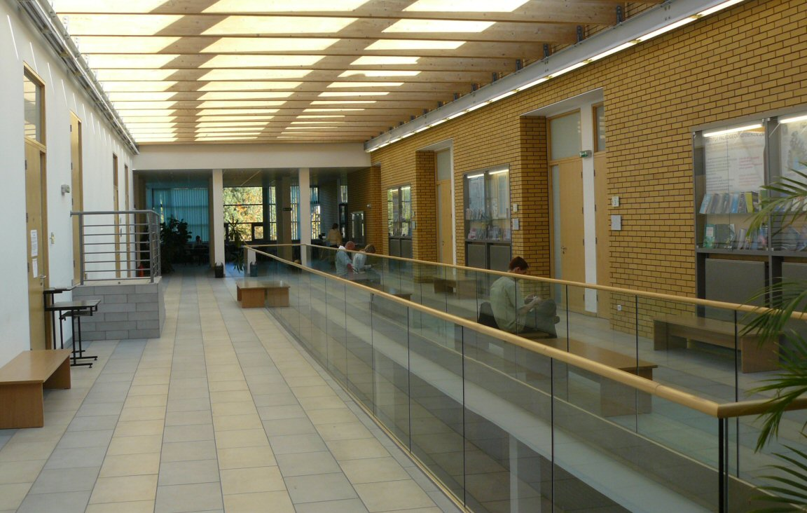 Wydział Nauk Geograficznych i Geologicznych Uniwersytetu im. Adama Mickiewicza